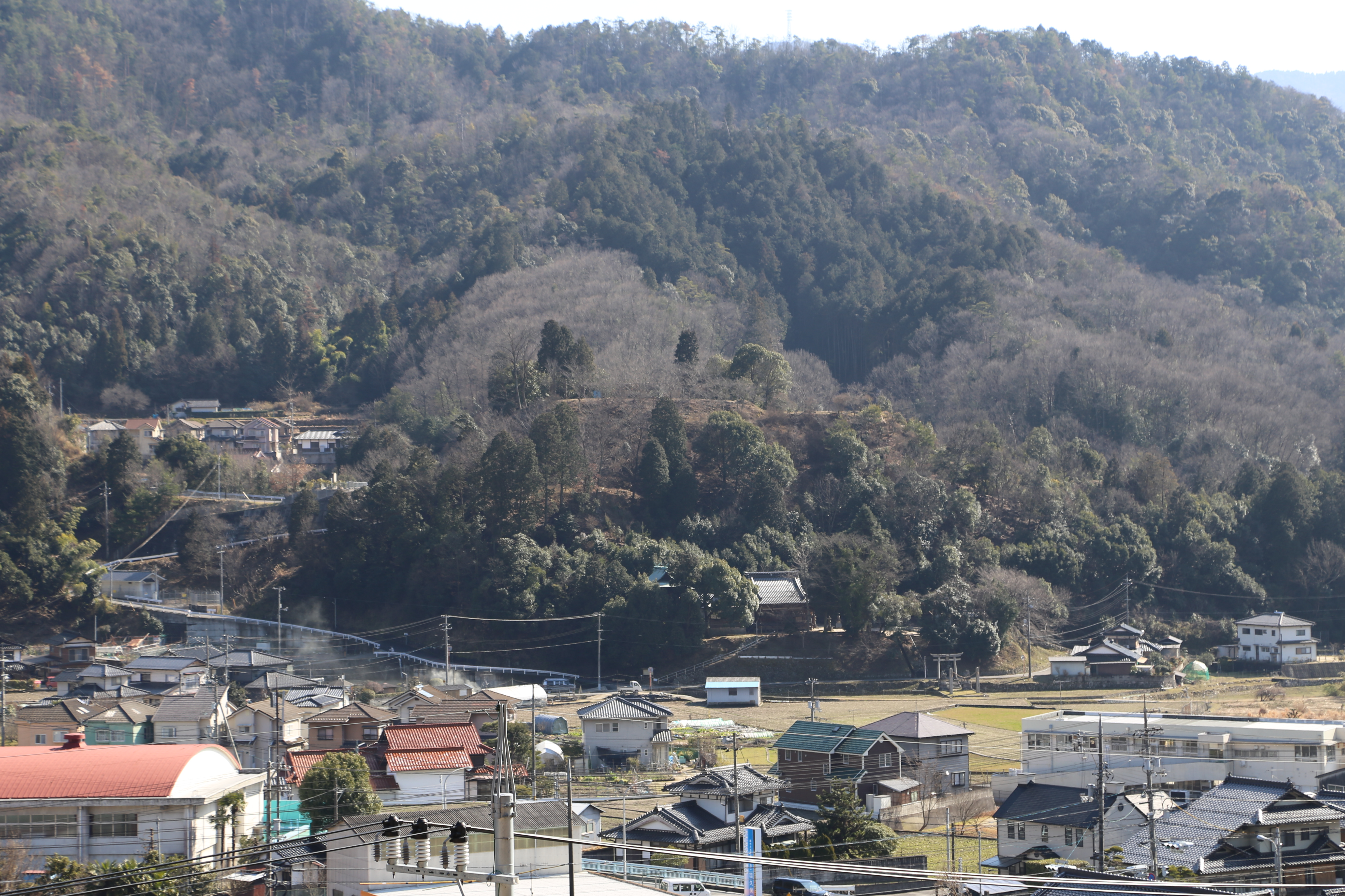 安芸国伊勢ヶ坪城近景 Canon EOS 6D